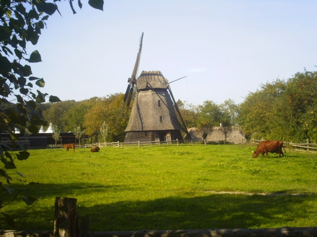 The Funen Village, ODense Denmark